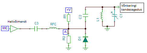 Eesti keelde tõlgitud pilt